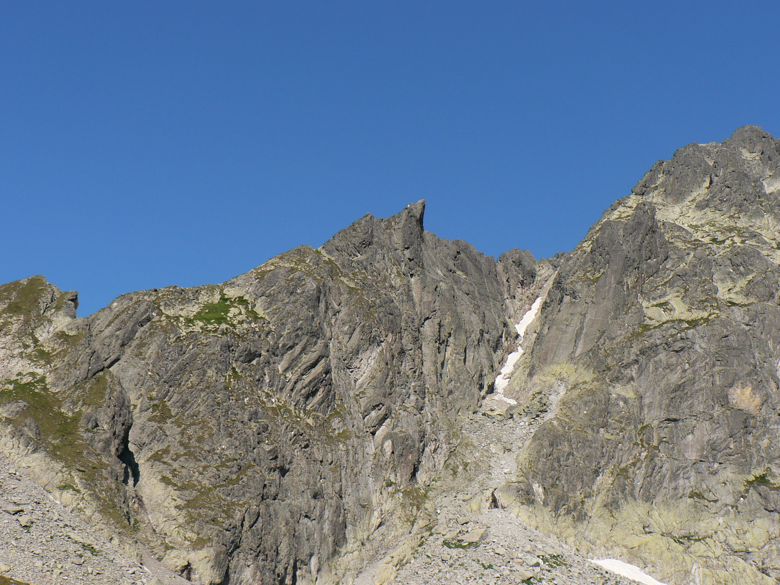 Grań Lodowej Kopy w Dolinie Pięciu Stawów Spiskich